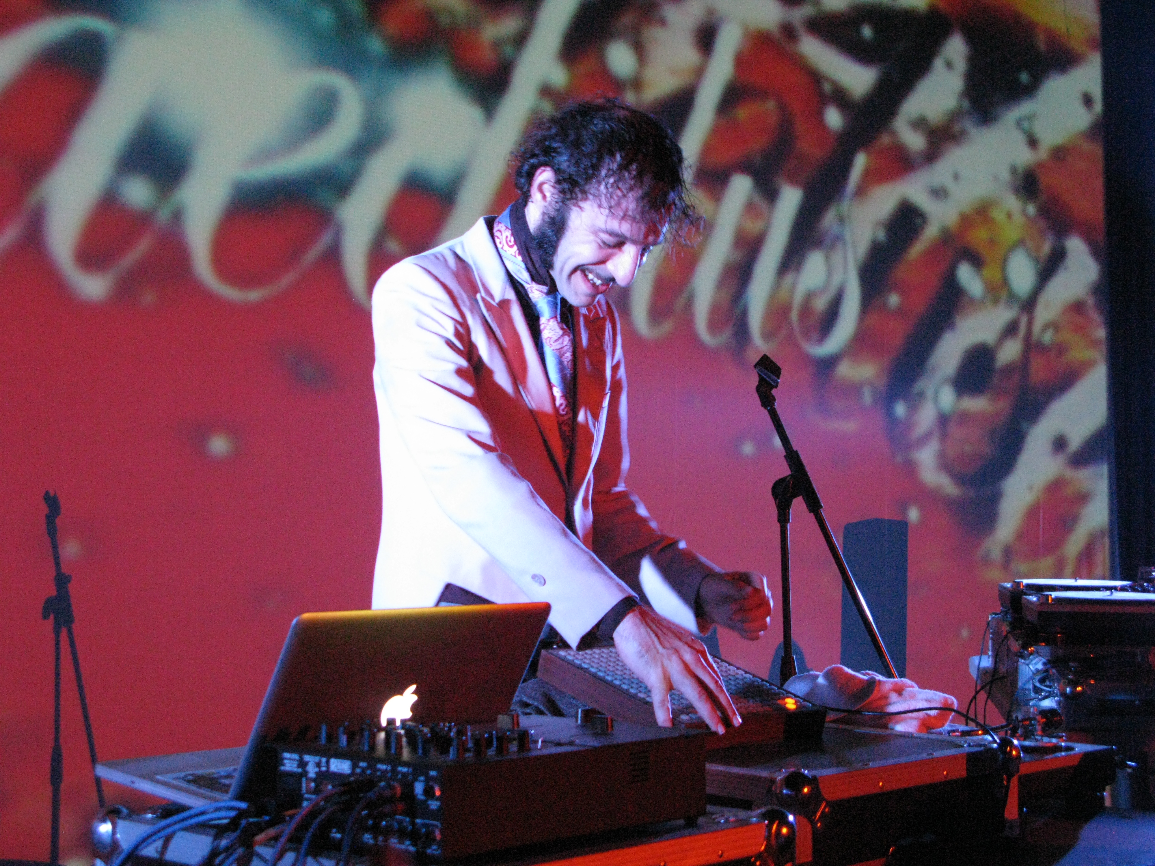 Daedelus all smiles